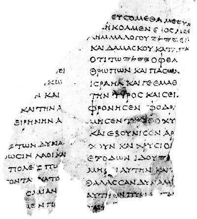 Handschriftenfragment (8HevXIIgr, Nahal Hever Kleine Propheten) der Septuaginta um die Zeitenwende mit dem Tetragramm in Zeilen 3, 5 und 13 in althebräischen Buchstaben.